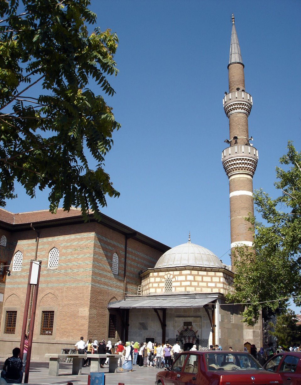 Hacı Bayram Mosque in Ankara, Turkey.